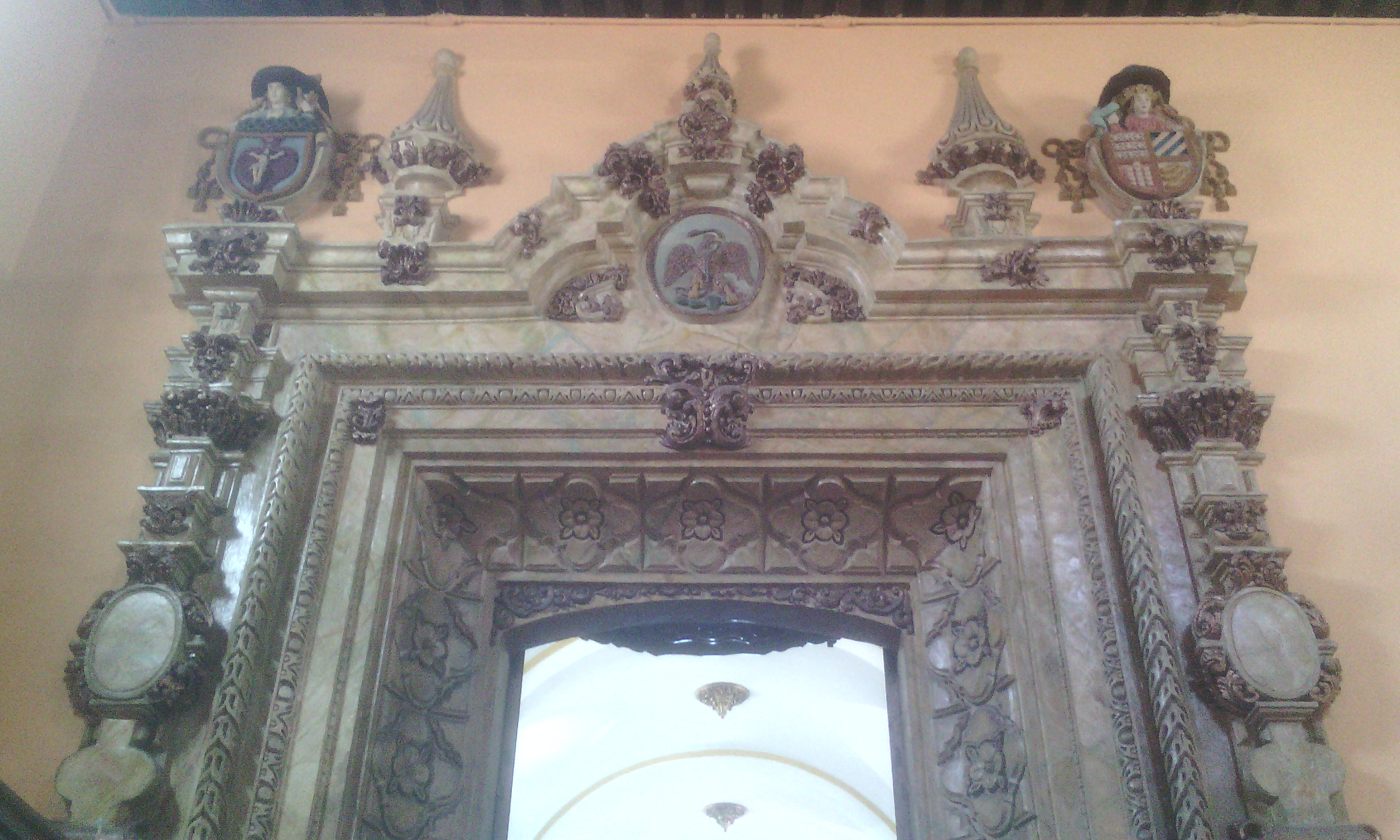 Este portal es la entrada de la biblioteca Palafoxiana